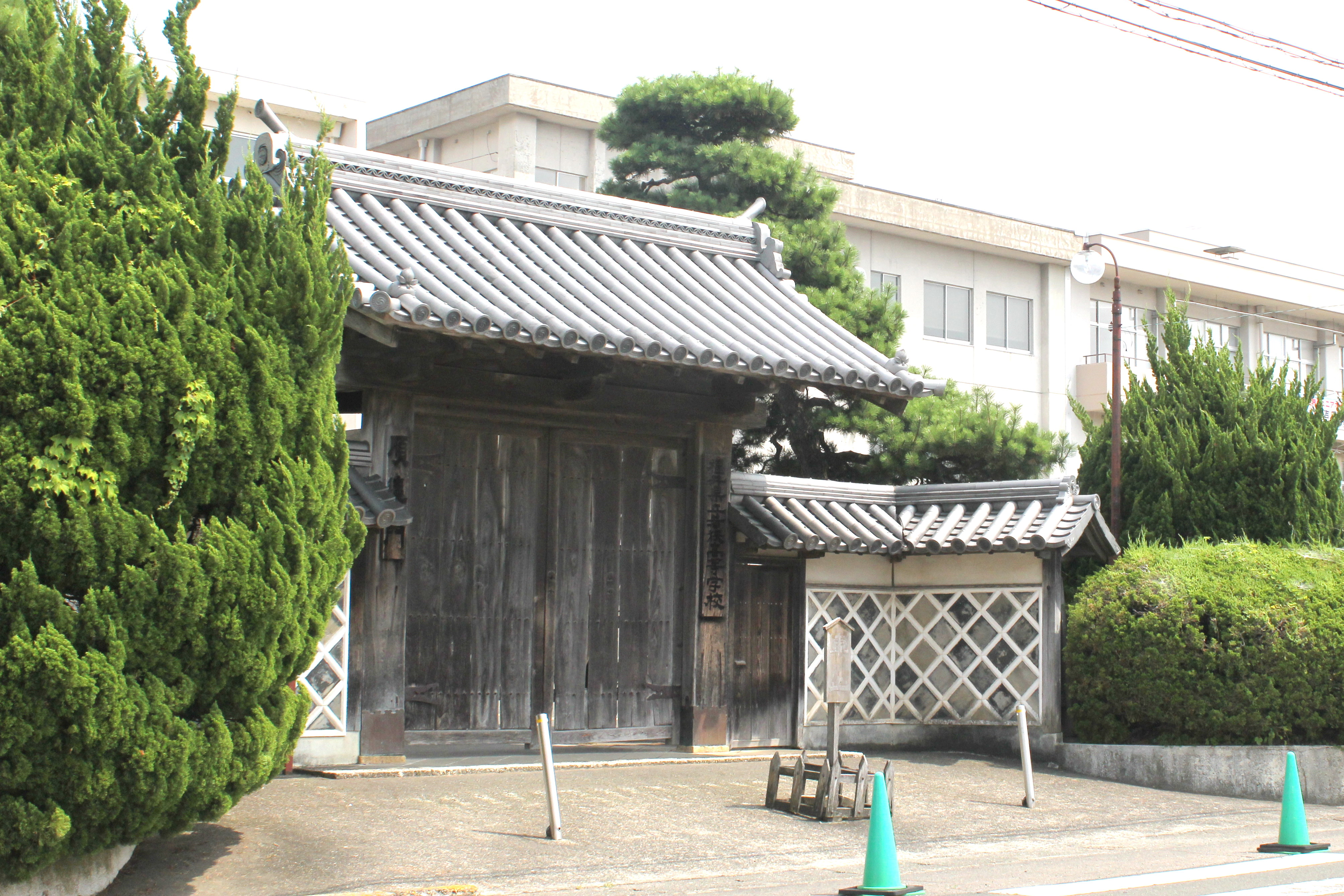 福井県立若狭高等学校の正門、順造門